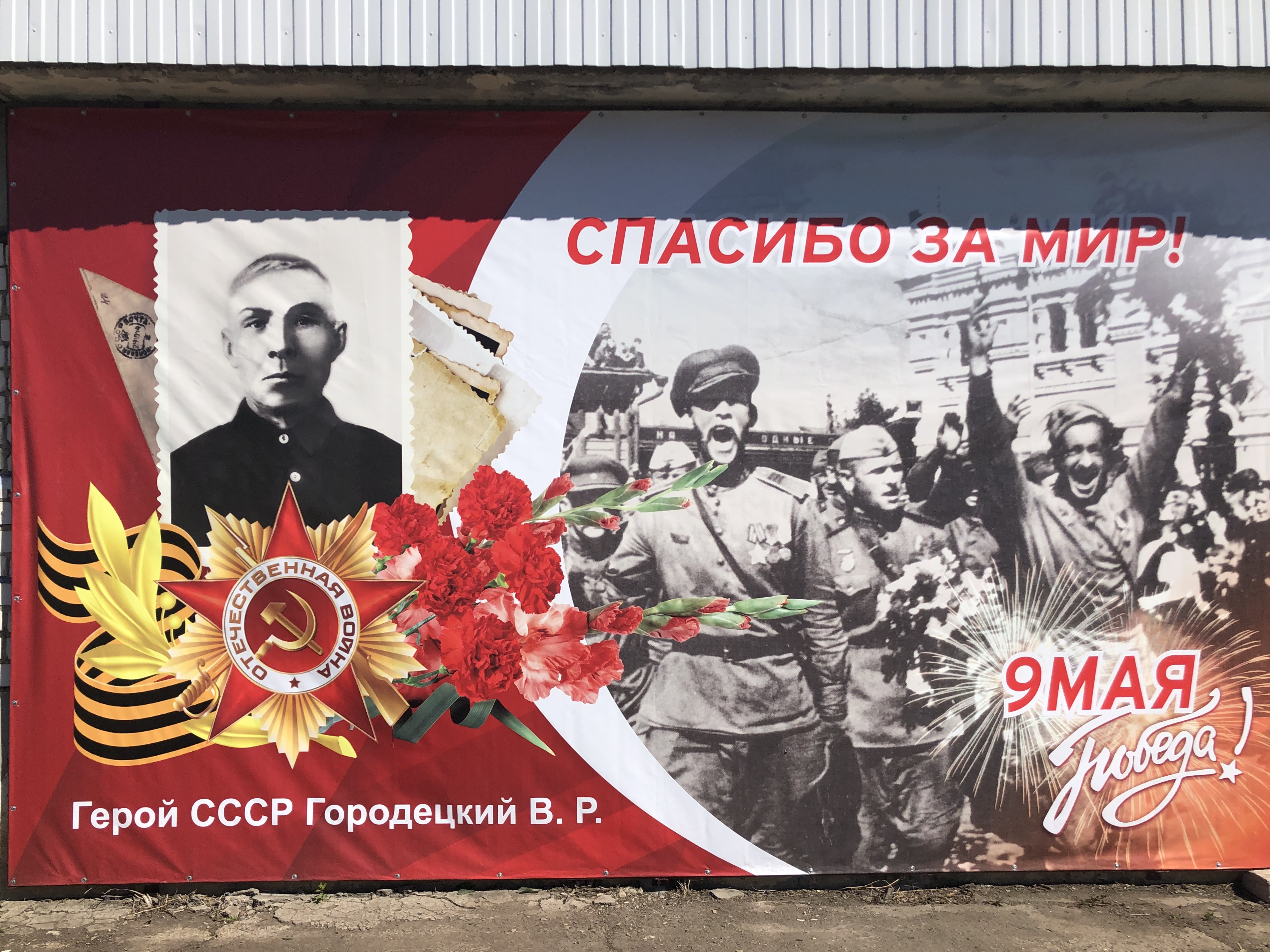 Праздничный плакат к Дню Победы в ВОВ в с. Крестниково с Городецким